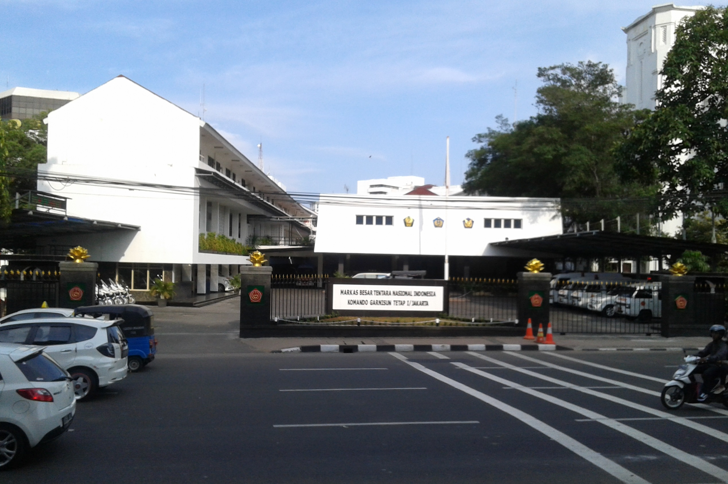 Markas Komando Garnisun Tetap I/Jakarta di Gambir, Jakarta Pusat